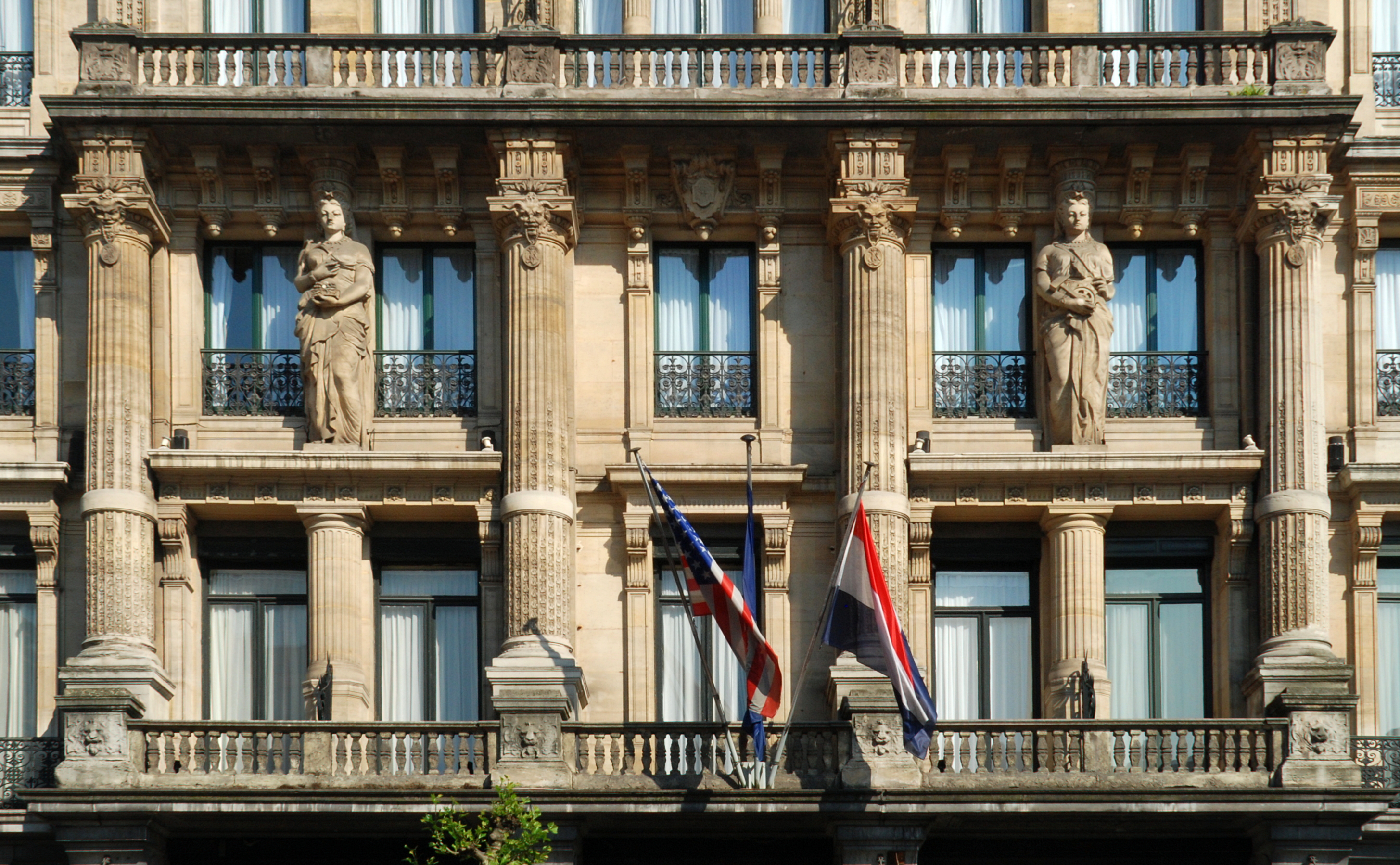 Belgique - Bruxelles - Café Métropole (architecte Gédéon Bordiau)